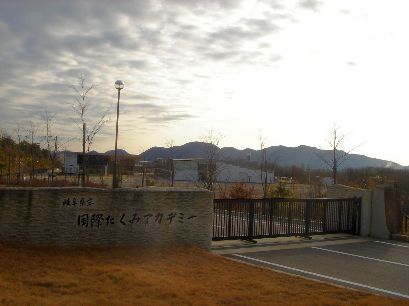 岐阜県立国際たくみアカデミー